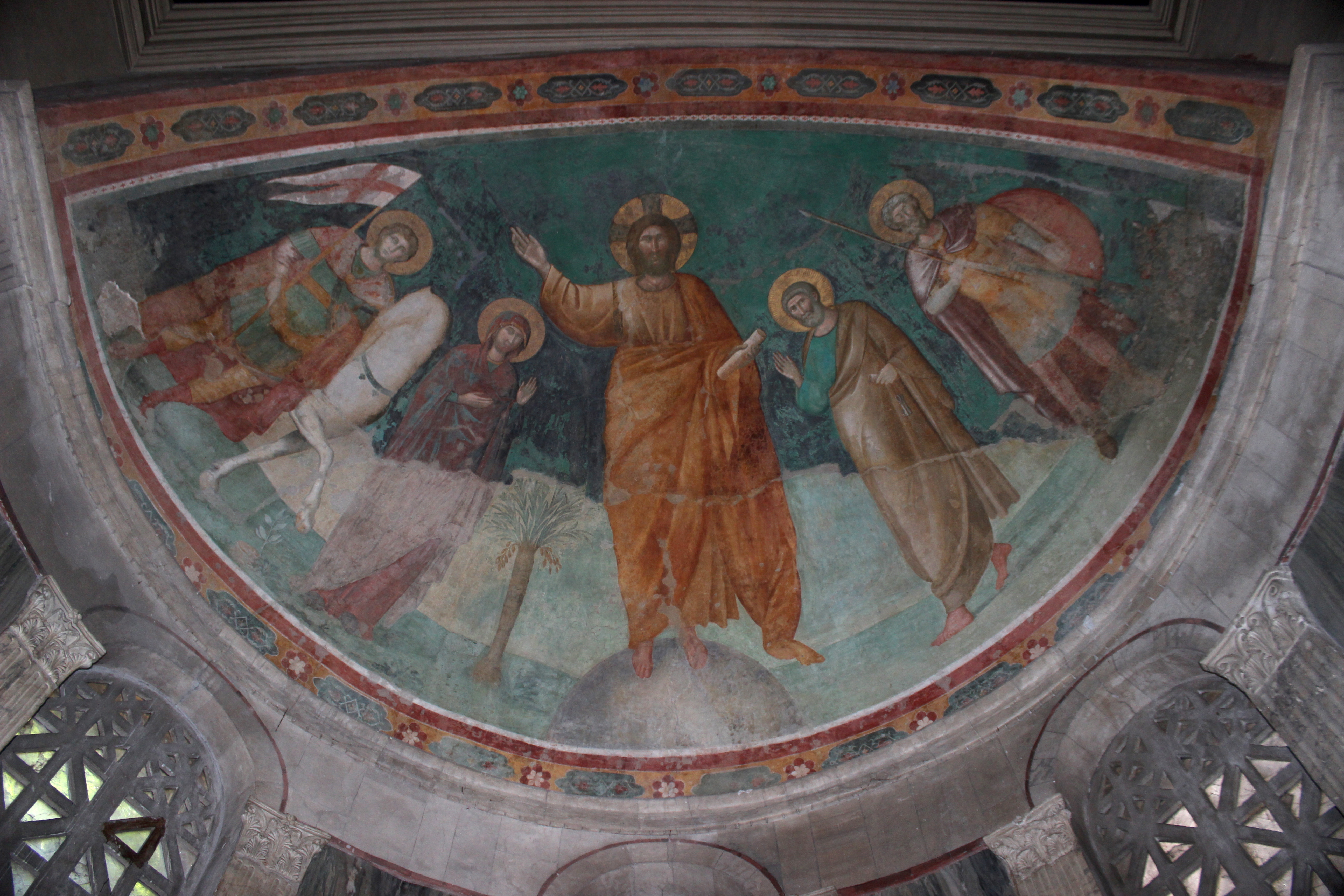 Roma. San Giorgio in Velabro. Interior. Fresco del ábside.